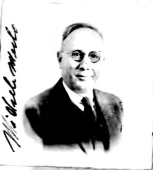 Mike Merlo born Michaelangelo Merloi